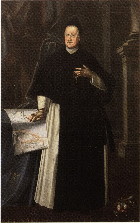 Evžen Tyttl (1666-1738), opat kláštera v Plasích.